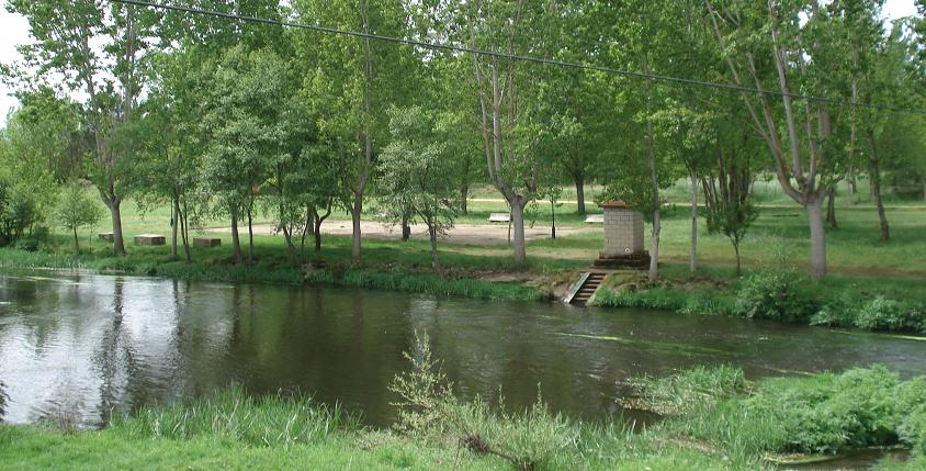 Rio Támega ó seu paso por Rabal